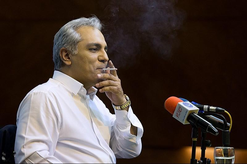 نشست خبری فیلم سینمایی ساعت ۵ عصر - نشست خبری فیلم سینمایی «ساعت ۵ عصر» به کارگردانی مهران مدیری عصر امروز (پنجشنبه ۴ شهریور) در سالن صدف هتل هما برگزار شد.